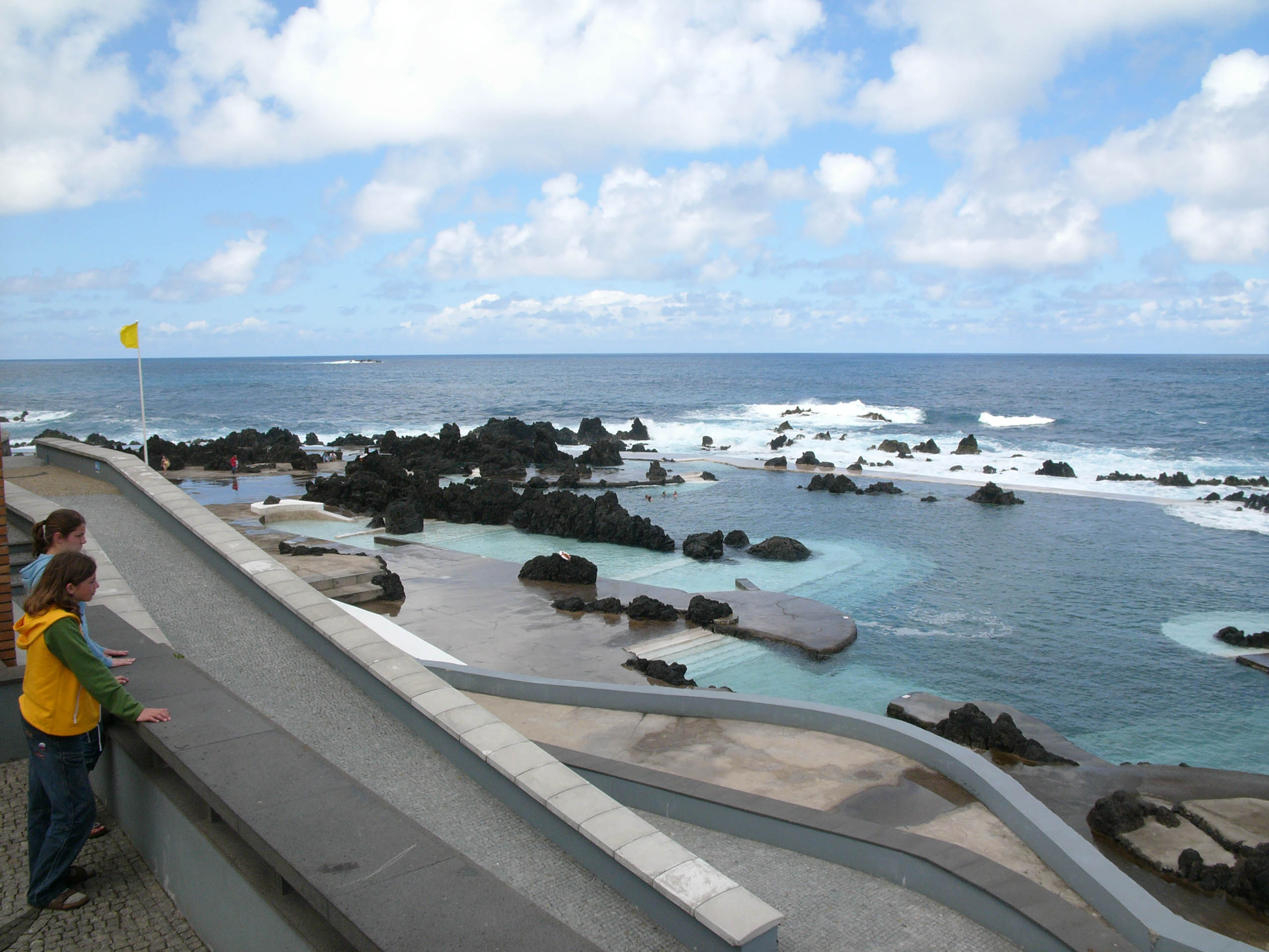 Natural piscine in Porto Moniz on Madeira